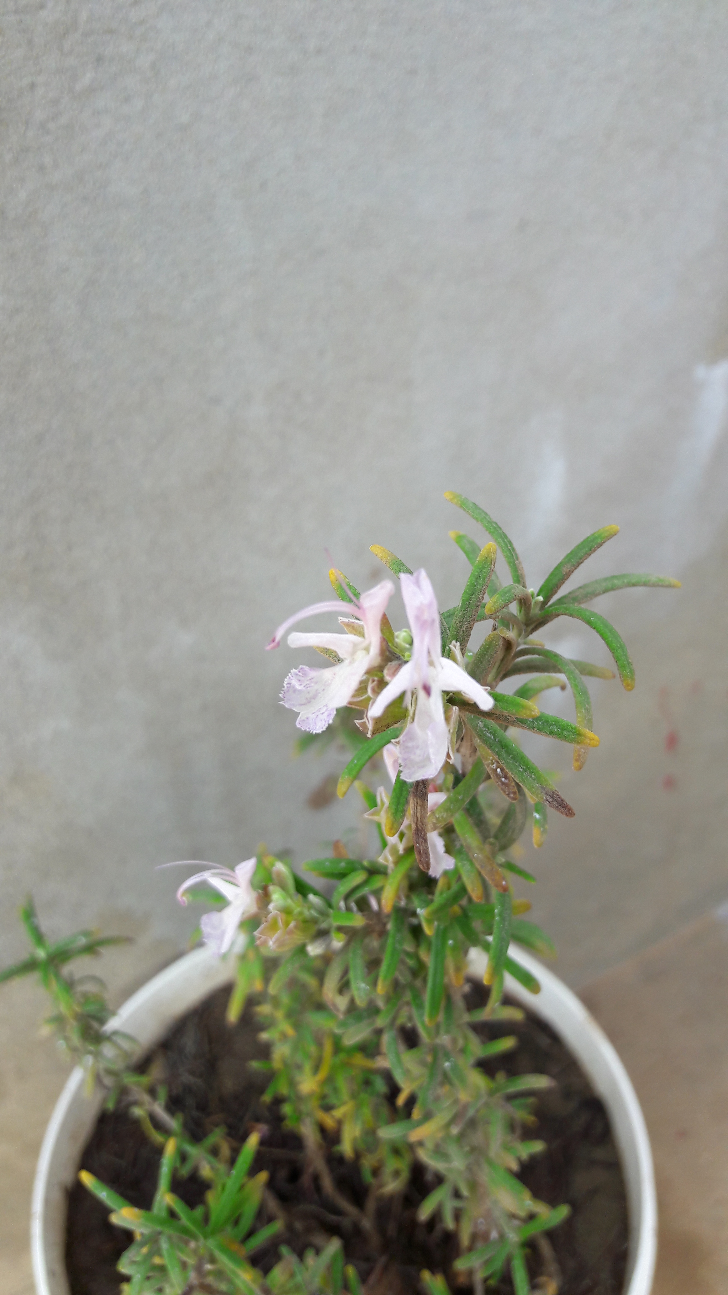 Fiori di rosmarino, di color viola.